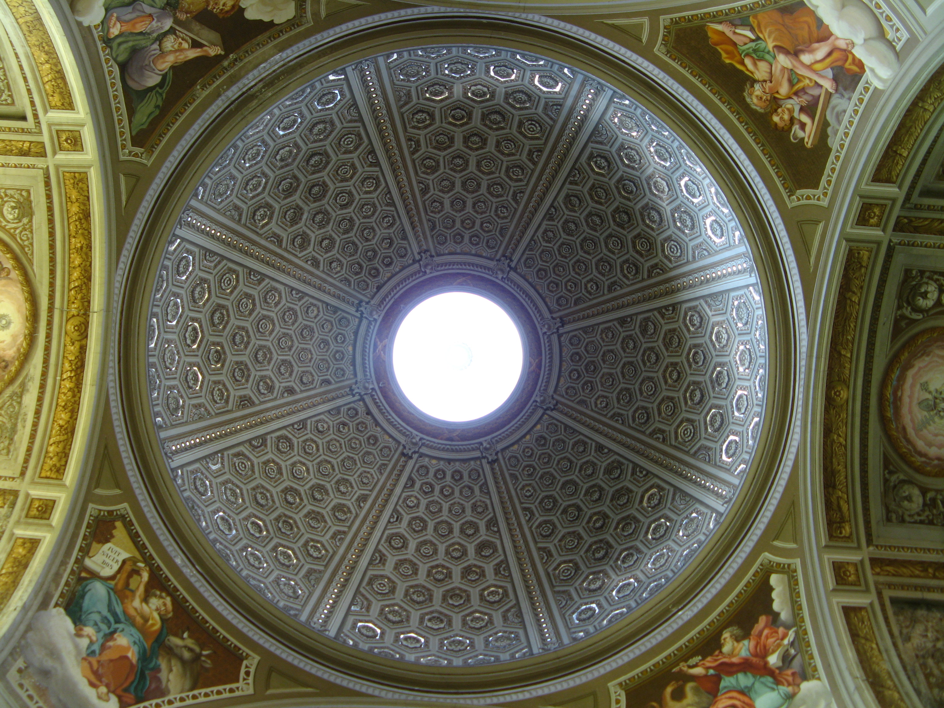 Genzano di Roma, Collegiata della SS Trinità, Cupola e pennacchi laterali